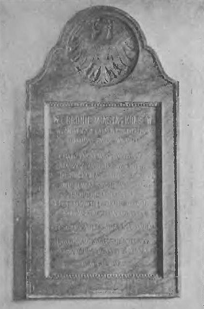 Tablica upamiętniająca uczniów IV Gimnazjum we Lwowie poległych w walkach w obronie Lwowa i Kresów, ustanowiona w gmachu szkoły przy ulicy Józefa Nikorowicza 2.